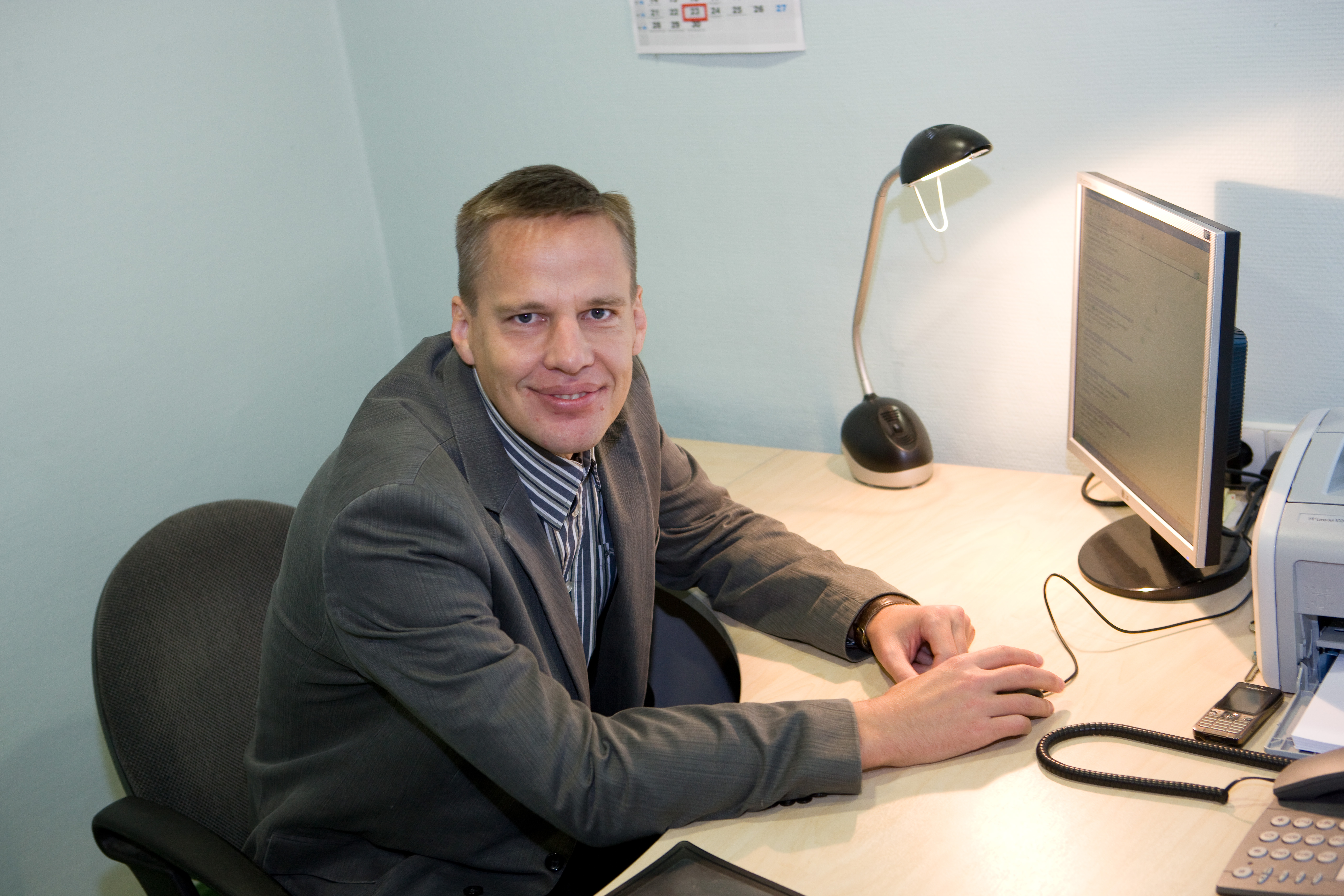 Tartu Ülikooli spordipedagoogika ja treeninguõpetuse instituudi treeninguõpetuse õppetooli juhataja, treeningõpetuse professor Jaak Jürimäe.